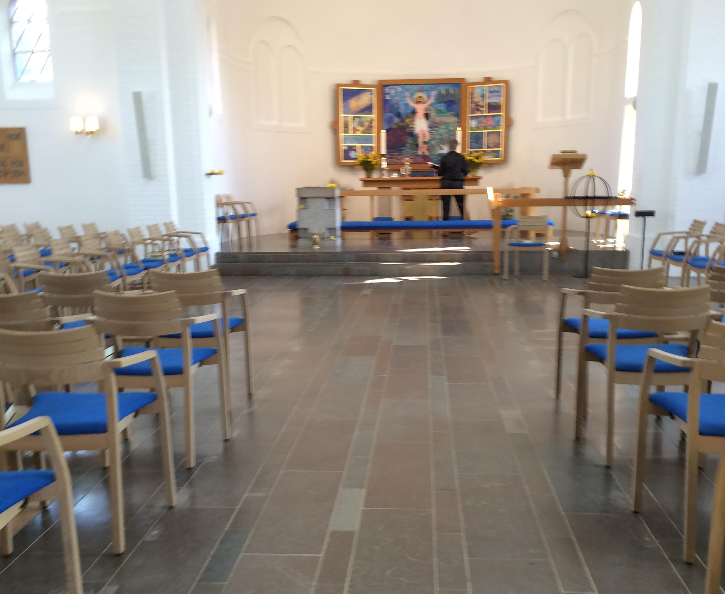 Kirkerummet i Hadsund Kirke.